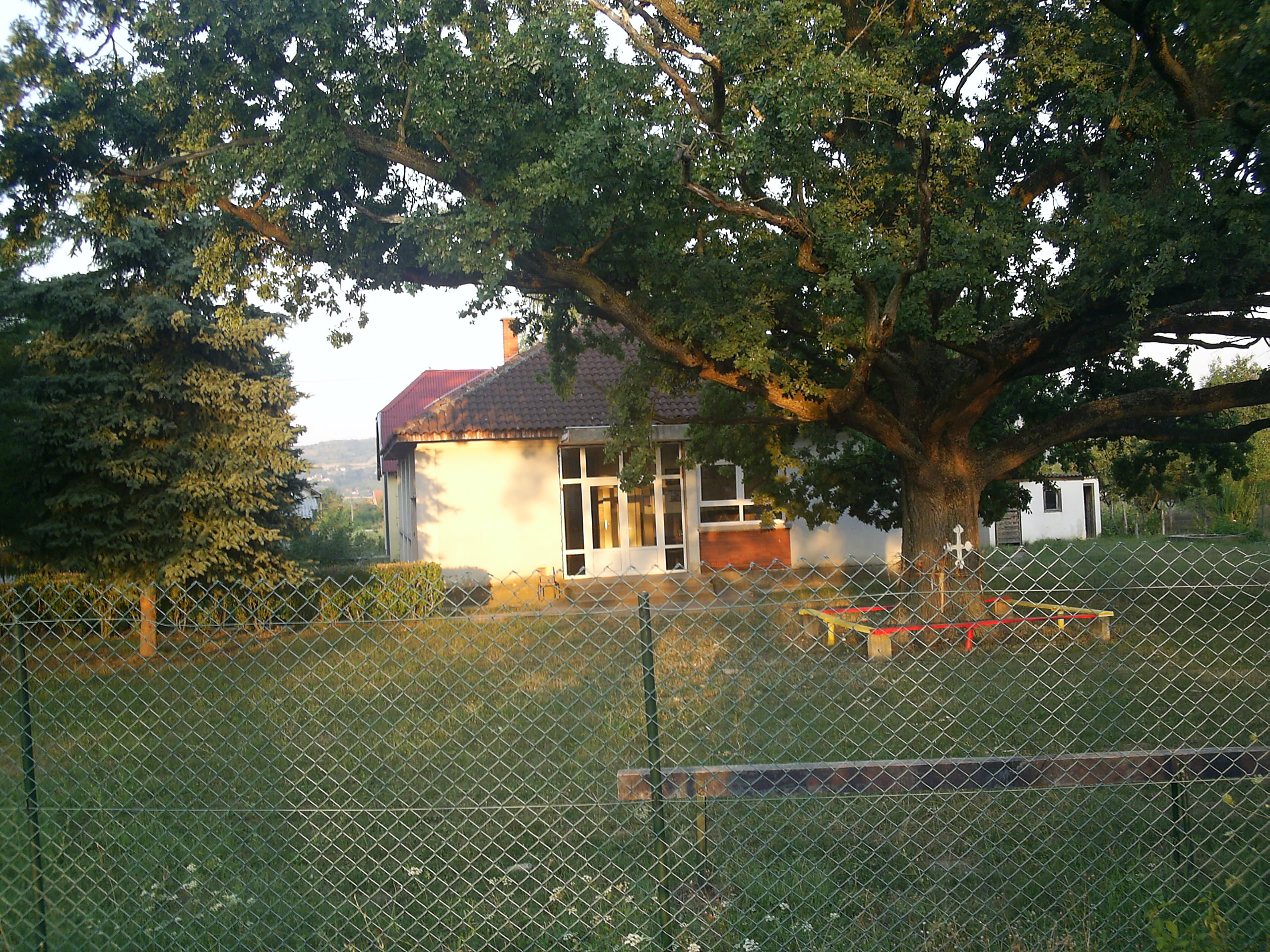 Основна школа „Свети Сава" Баточина издвојено одељење Милатовац